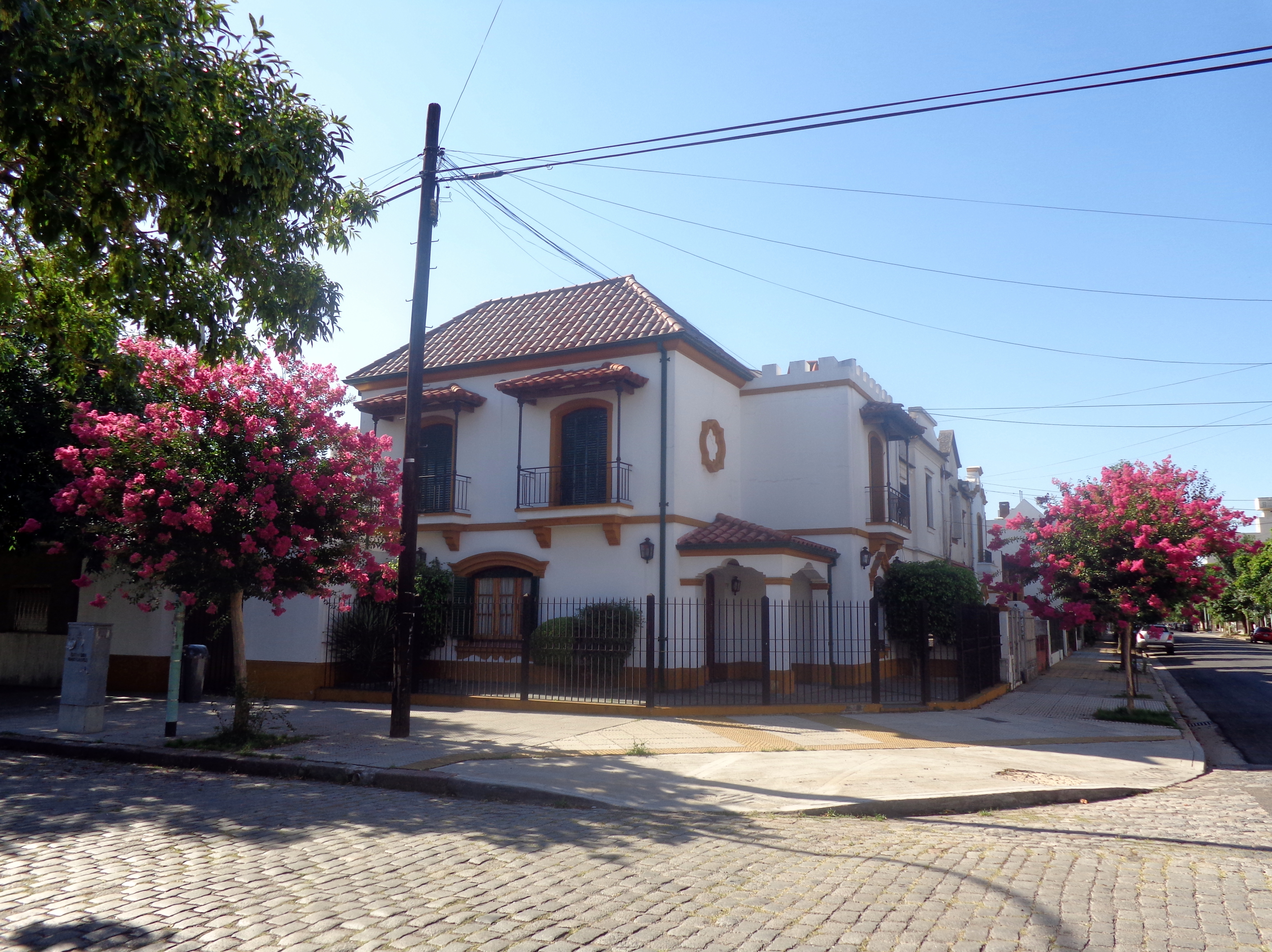 Arregui y Madero, en el Barrio de Versalles, Ciudad de Buenos Aires, Argentina.